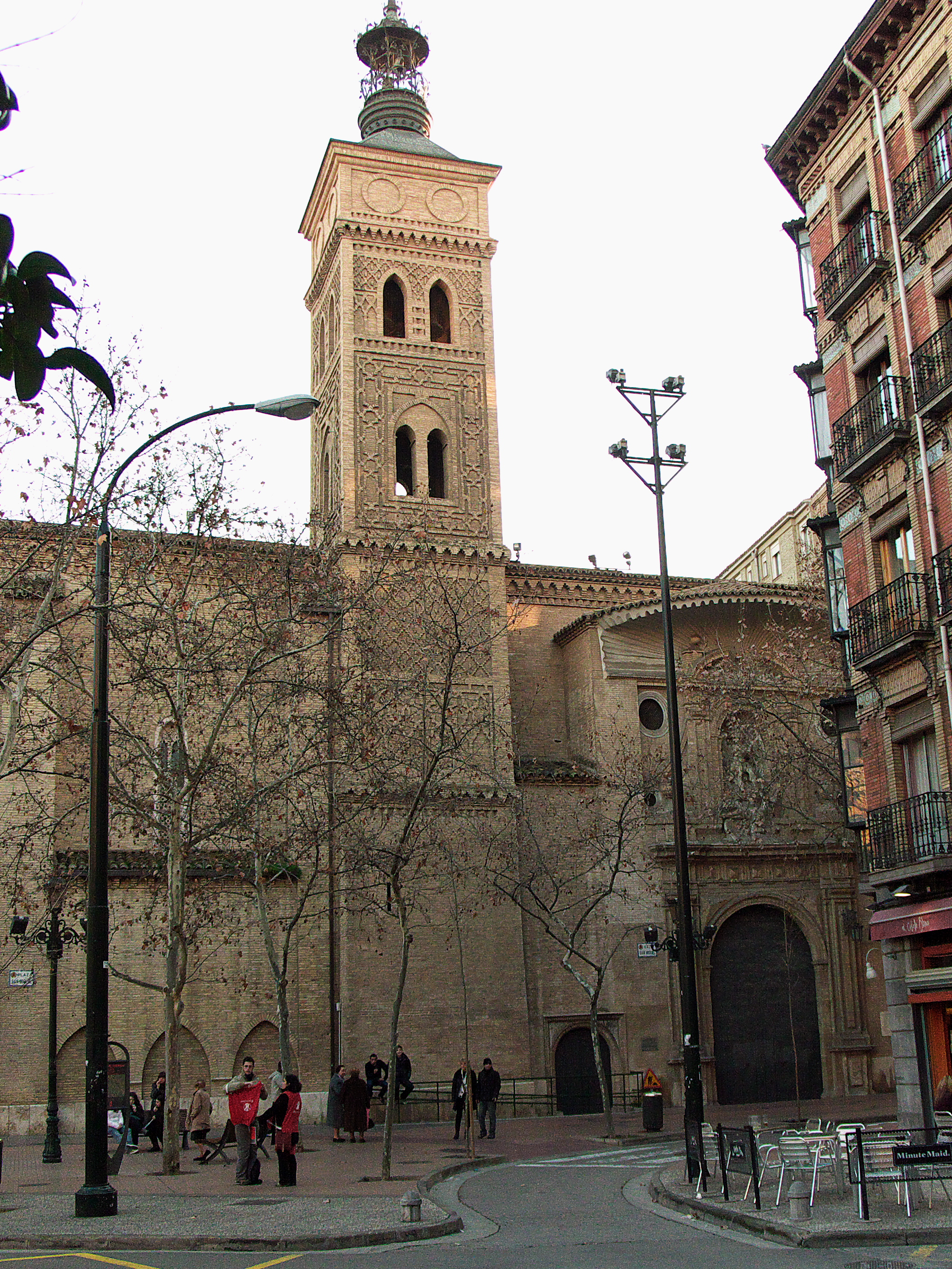 Ejemplar campanario del mudéjar aragonés o el arte en el empleo del ladrillo.